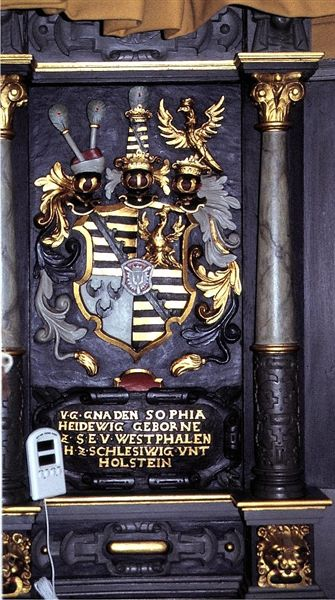 Ærøskøbing Kirke i Danmark. Prædikestol